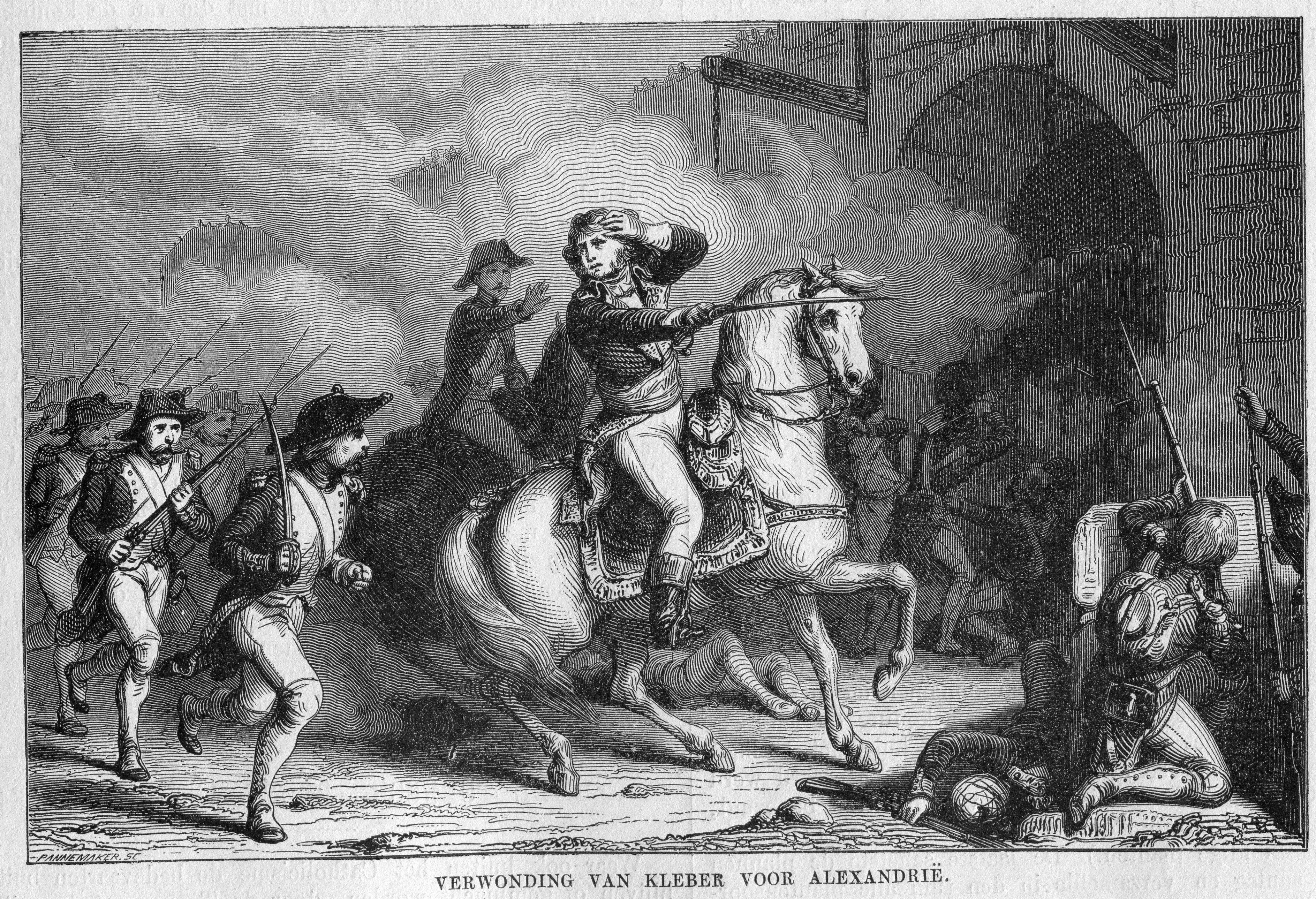 Kath. Illustratie 1869-1870 nr 42 p.329 Verwonding van Kleber voor Alexandrië